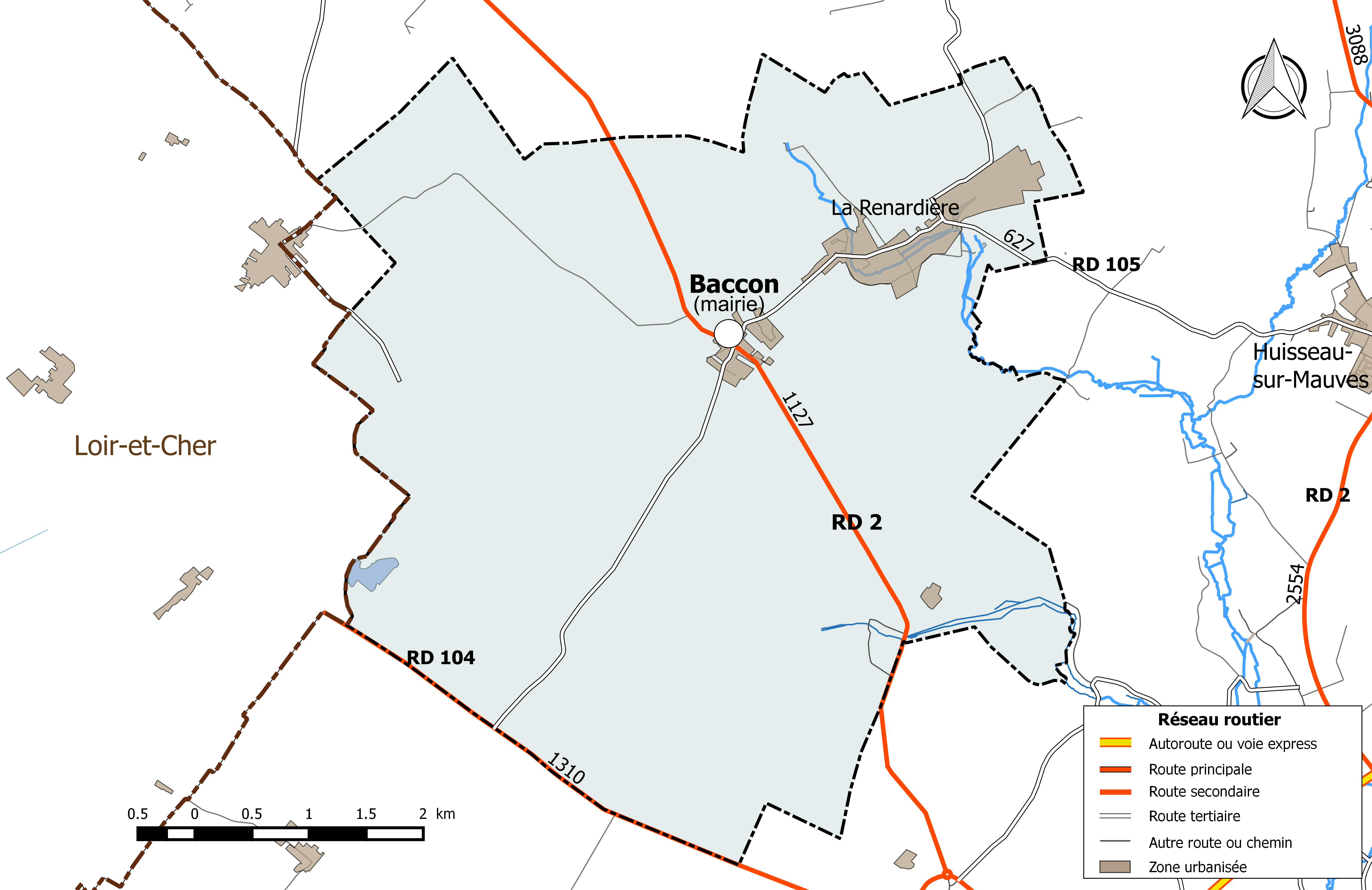 Carte du réseau routier de la commune de Baccon.